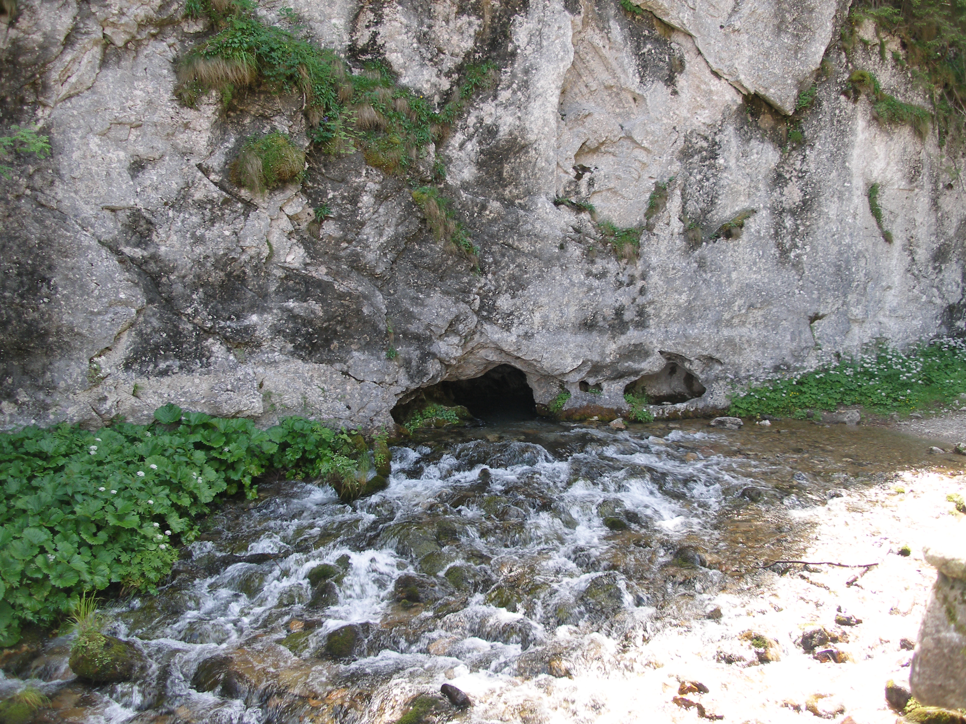 Wypływ krasowy z Jaskini Wodnej pod Pisaną w Dolinie Kościeliskiej, w Tatrach Zachodnich